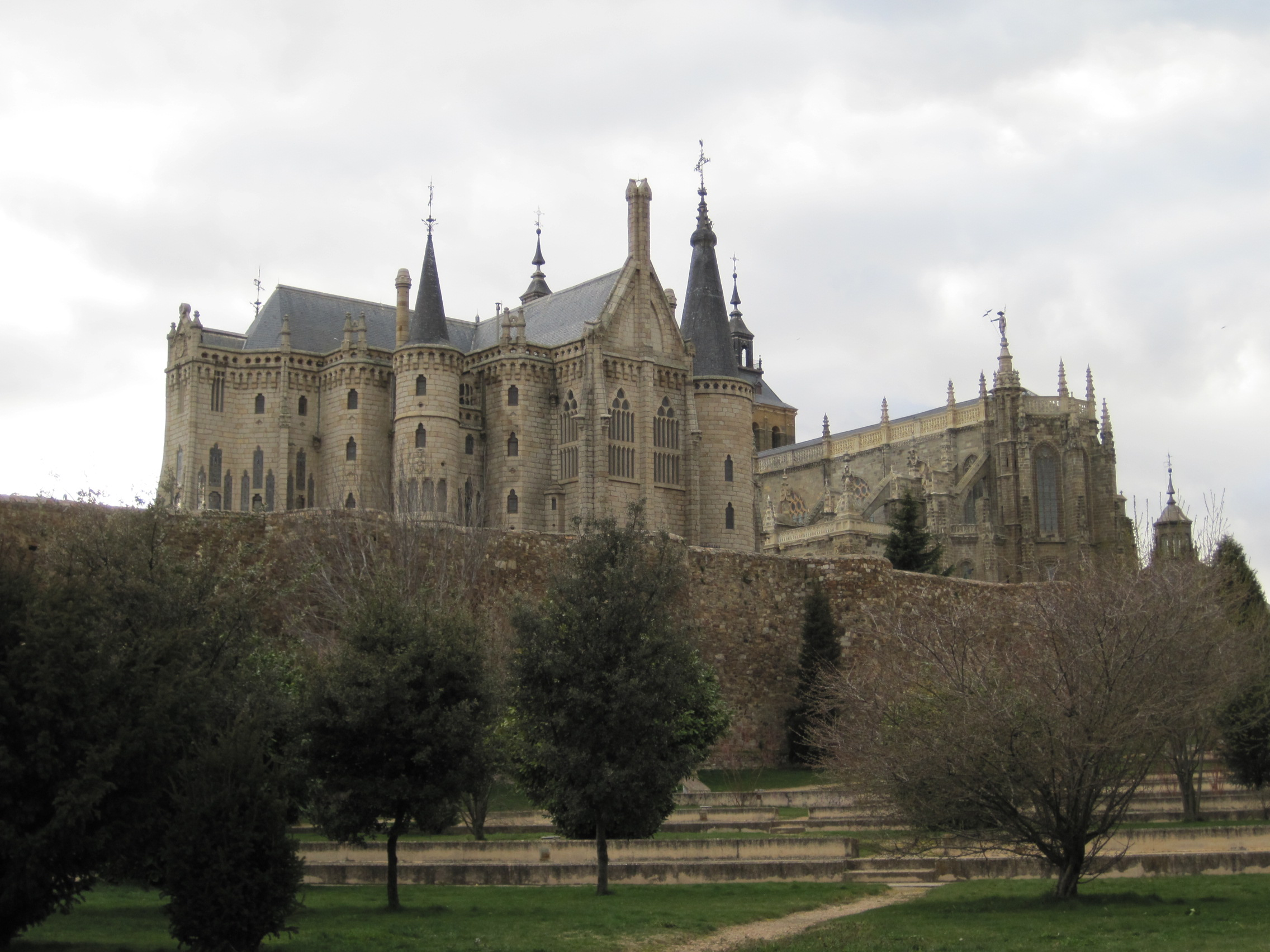 Vista de la muralla de Astorga (León, España), con la catedral y el Palacio Episcopal al fondo.